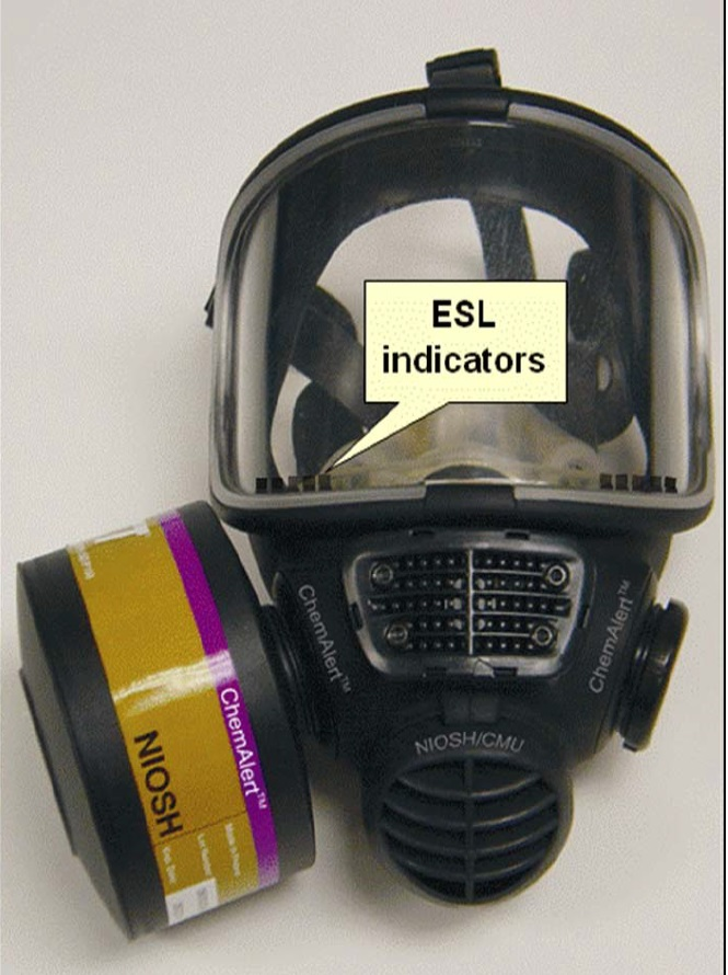 Перспективная полнолицевая маска противогазного респиратора, снабжённая индикаторами окончания срока службы фильтра (ESLI)